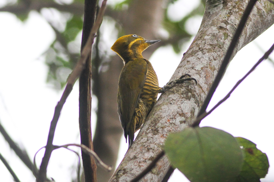 female